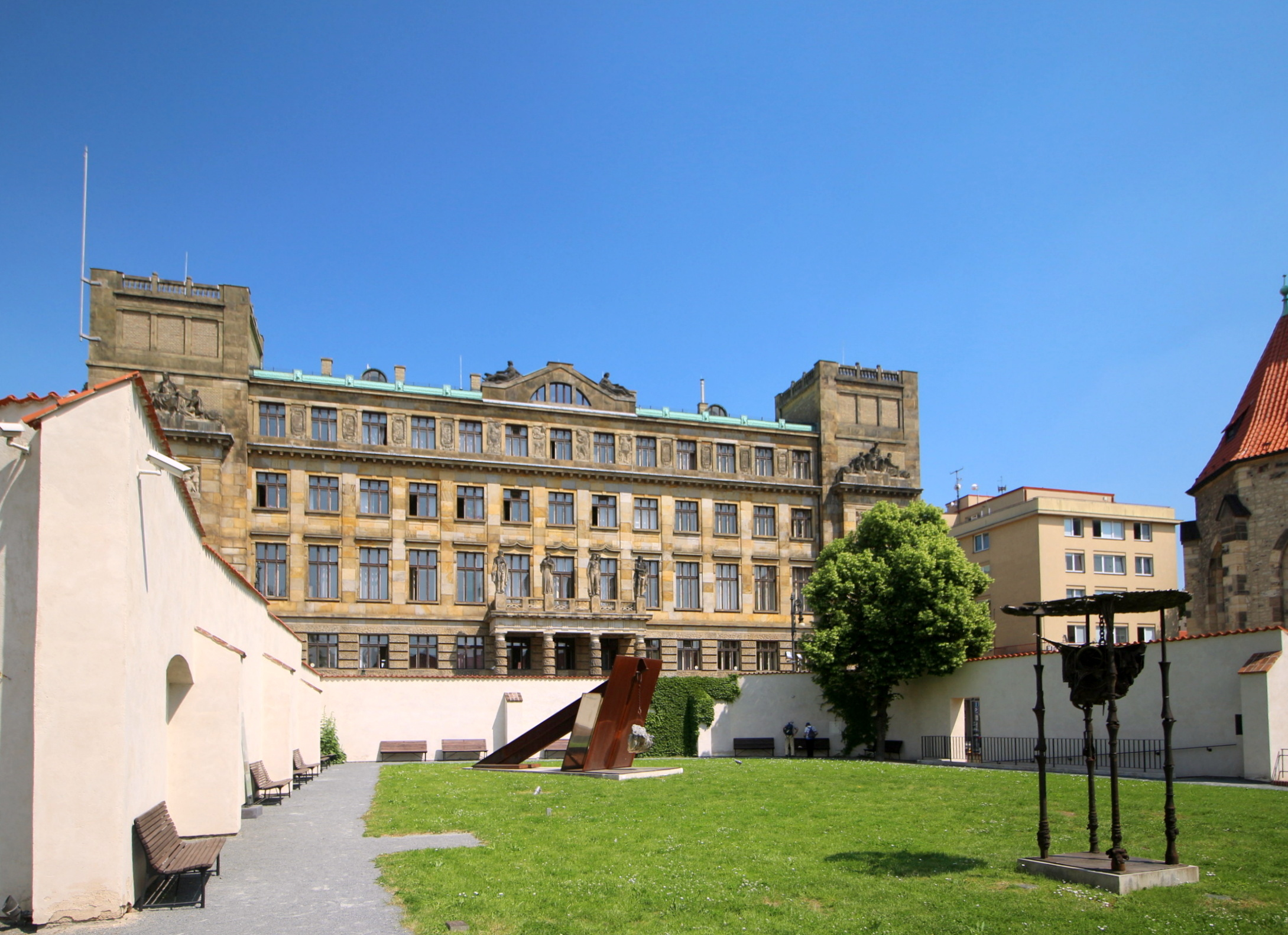 Anežský klášter